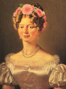 Wilhelmine Marie, prinsesse Danmark (1808-1891